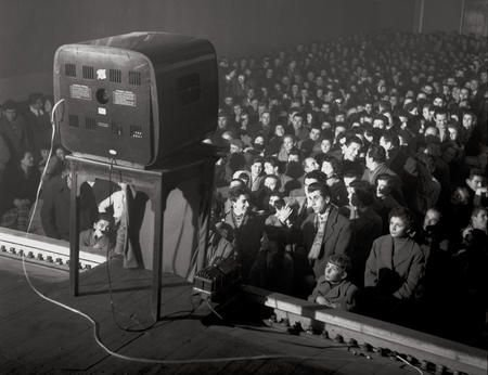 Trasmissione del 1 gennaio 1959.